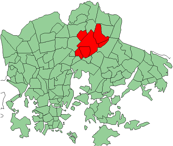 Helsingin kartta jossa Malmin kaupunginosa korostettuna. Muokattu tiedostosta File:Helsinki districts-Malmi.png, jossa on korostettuna Malmin peruspiiri.